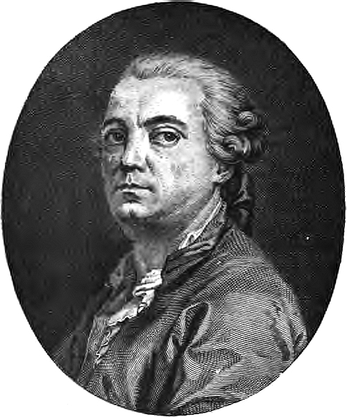 Portrait du comédien Lekain (1729-1778) du Théâtre-francais